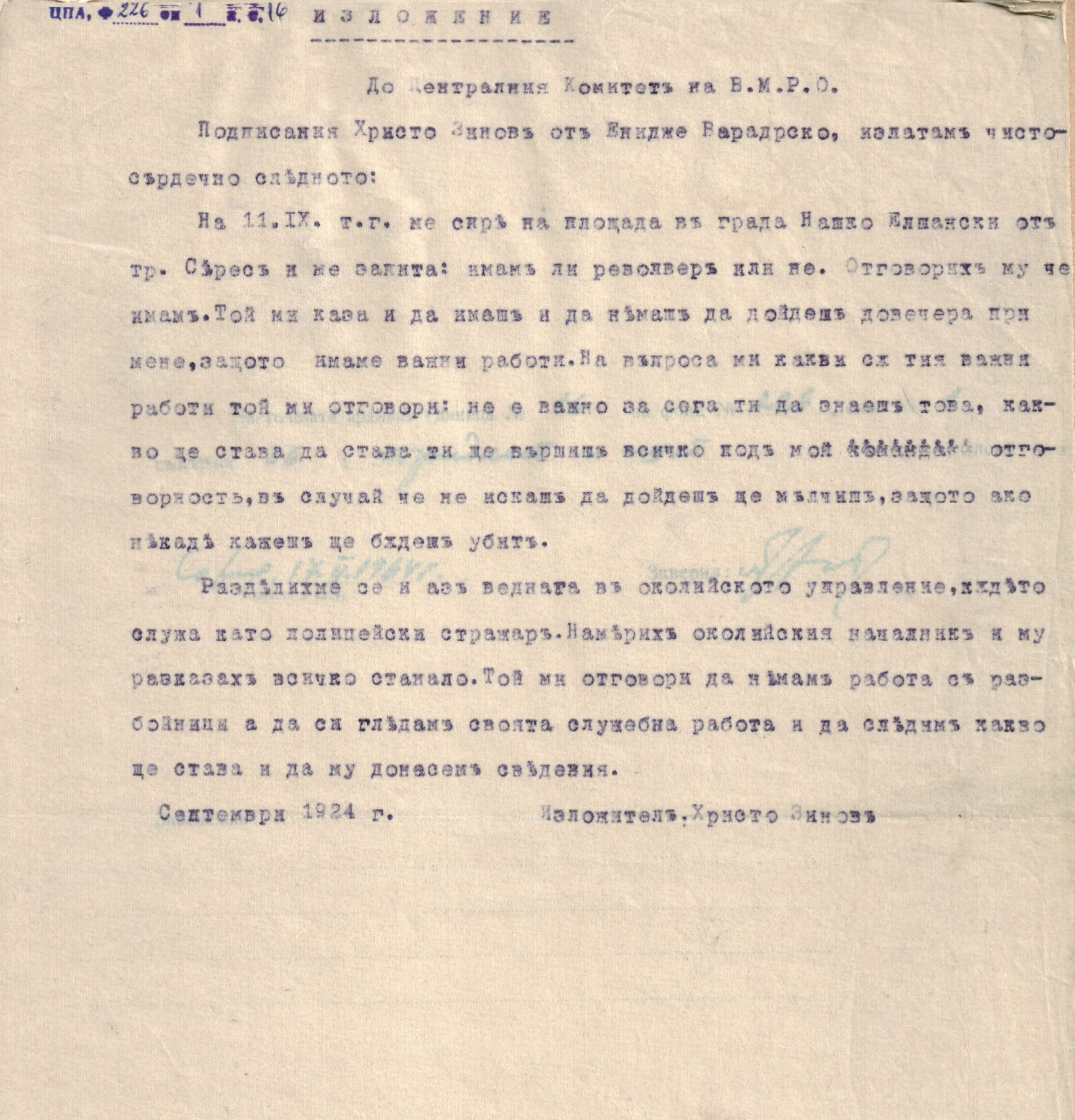 Дознания и изложения на лица от ВМРО по Горноджумайските събития във връзка с убийството на Тодор Александров.